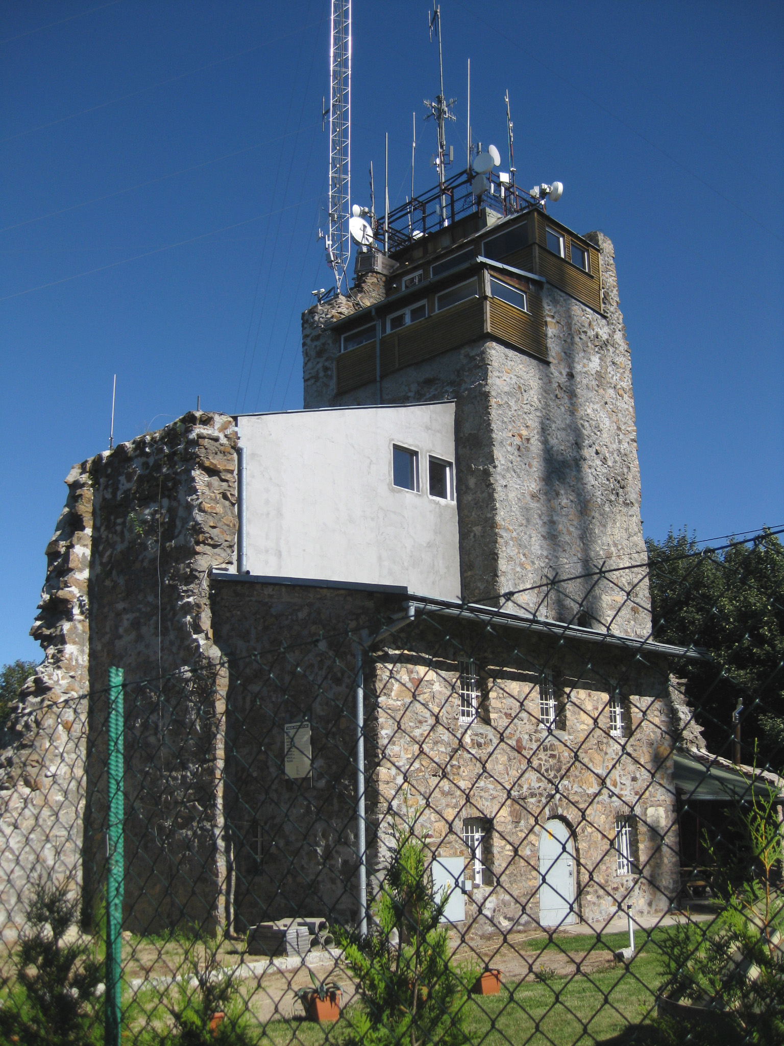 Rozhledna na Chełmiecu